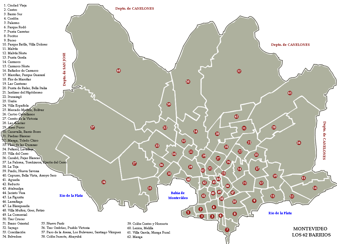 Plano del Departamento de Montevideo. Numeración y Nombre de los Barrios según Cartografía Instituto Nacional Estadísticas. Este mapa tiene errores garrafales tremendos. Urgente los editores y revisores de wikipedia retirarlo. Personalmente estuve hablando con la directora de Cartografía del Instituto Nacional de Estadística del Uruguay, y pude corroborar personalmente que es absolutamente errado.